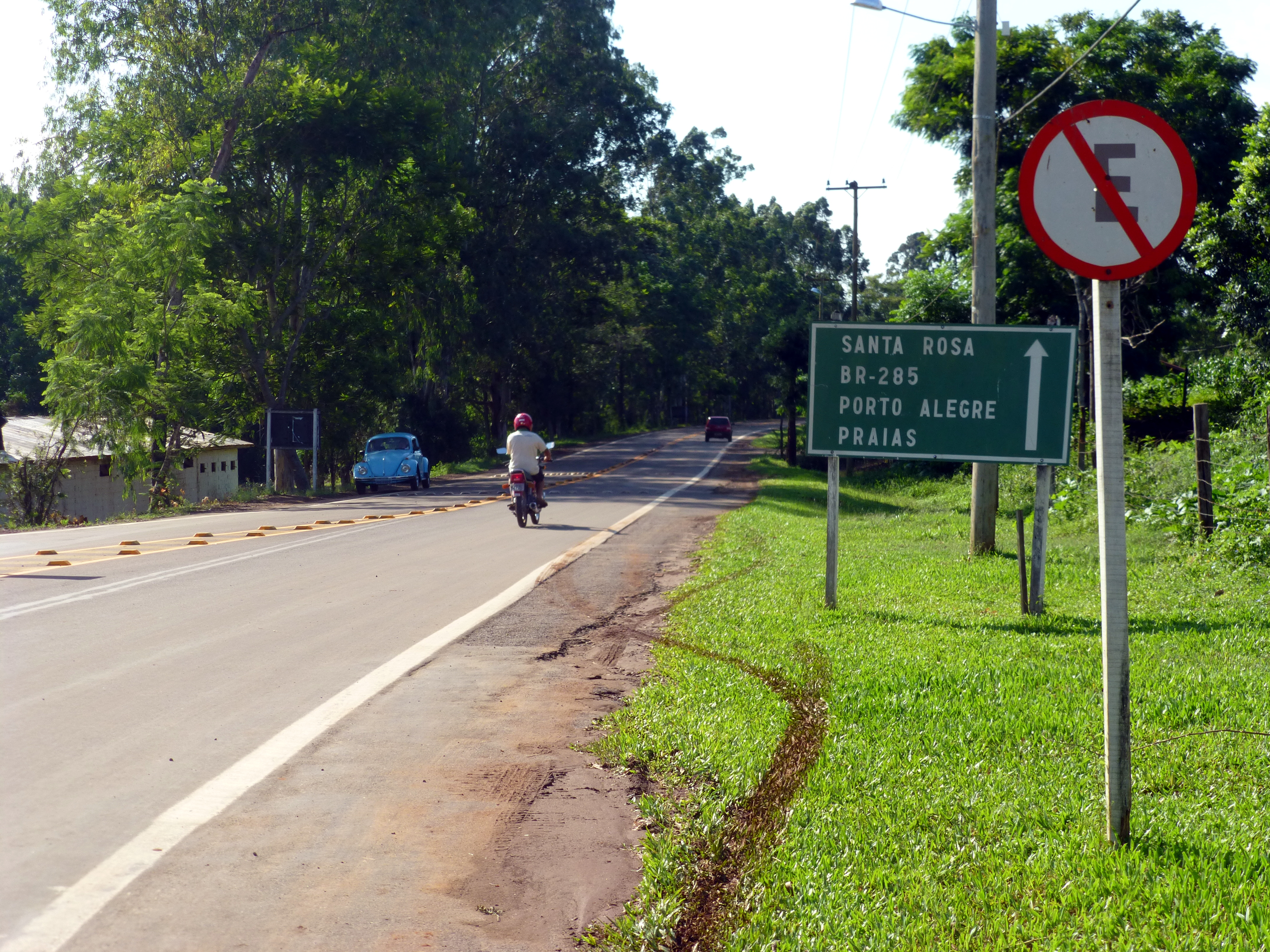 El kilómetro 0 de la carretera RS-344 en la ciudad de Porto Mauá, en Rio Grandeo do Sul (Brasil), frontera con Argentina.